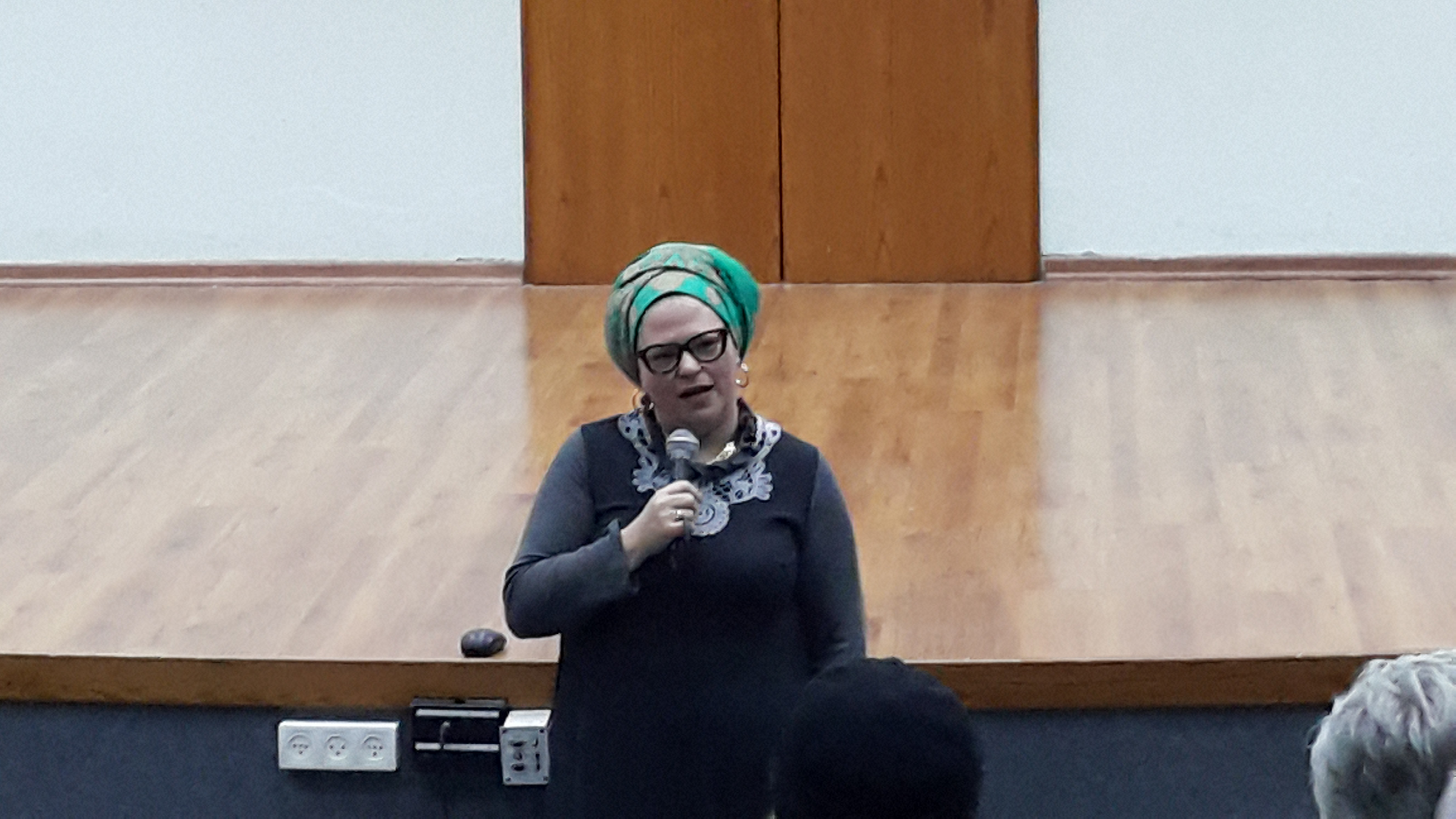 רמה בורנשטיין